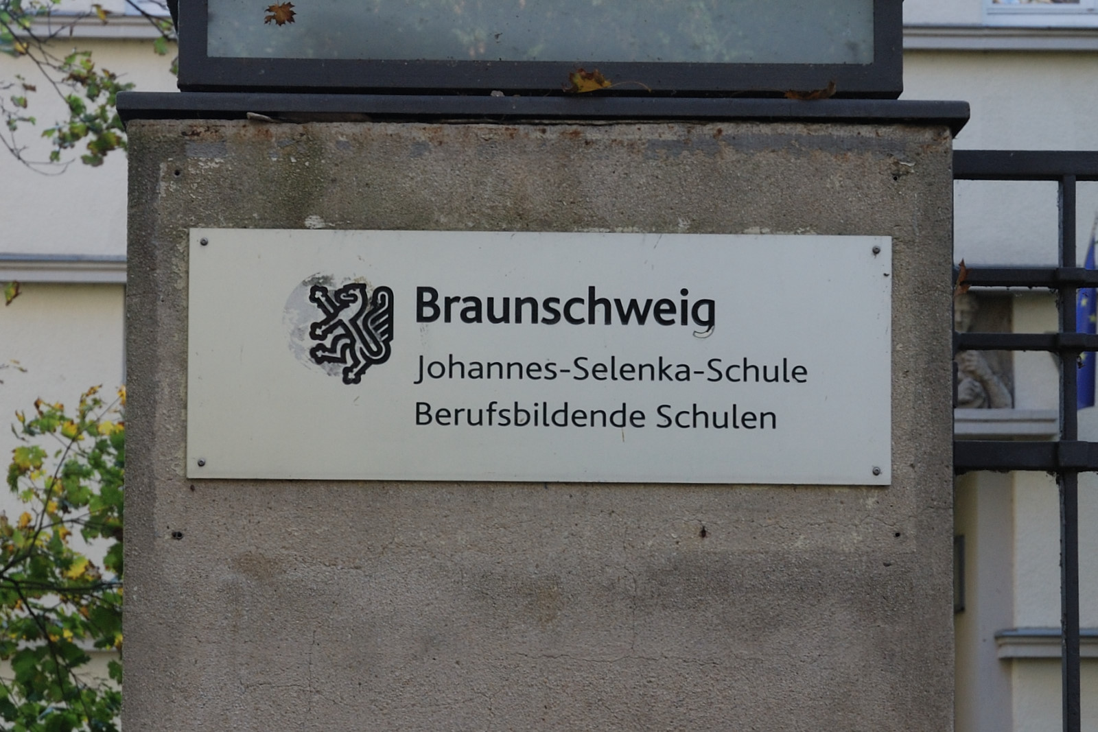 Schild der Johannes-Selenka-Schule (Berufsbildende Schulen der Stadt Braunschweig), Inselwall 1a, Braunschweig